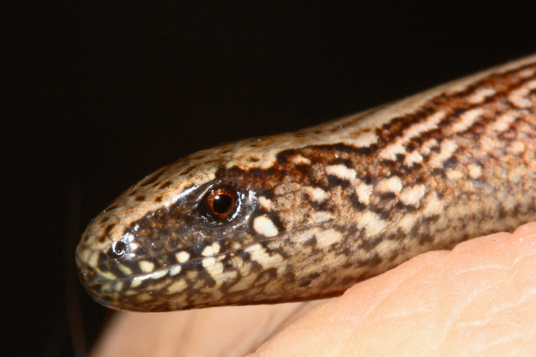 Blindschleiche (Anguis fragilis)